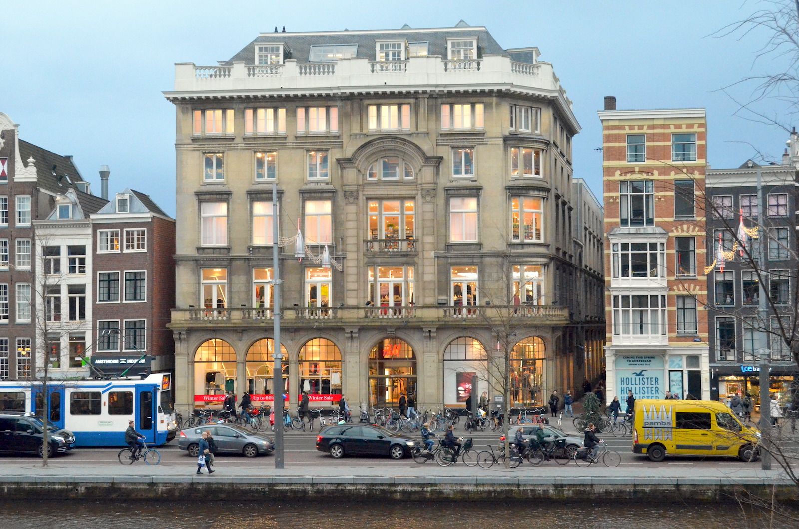 Voormalig gebouw van Maison de Bonneterie aan het Rokin in Amsterdam, nu Hennes & Mauritz; 19 december 2019. Foto: Erik Swierstra.